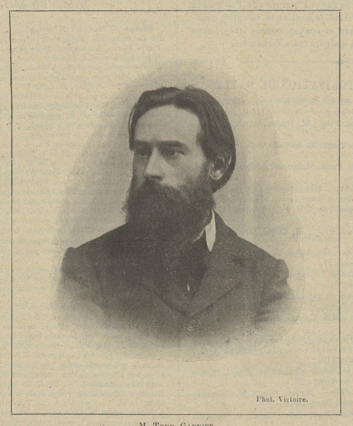 Portrait de l'architecte lyonnais Tony Garnier, paru dan le journal la Construction lyonnaise n 18 du 16/09/1899